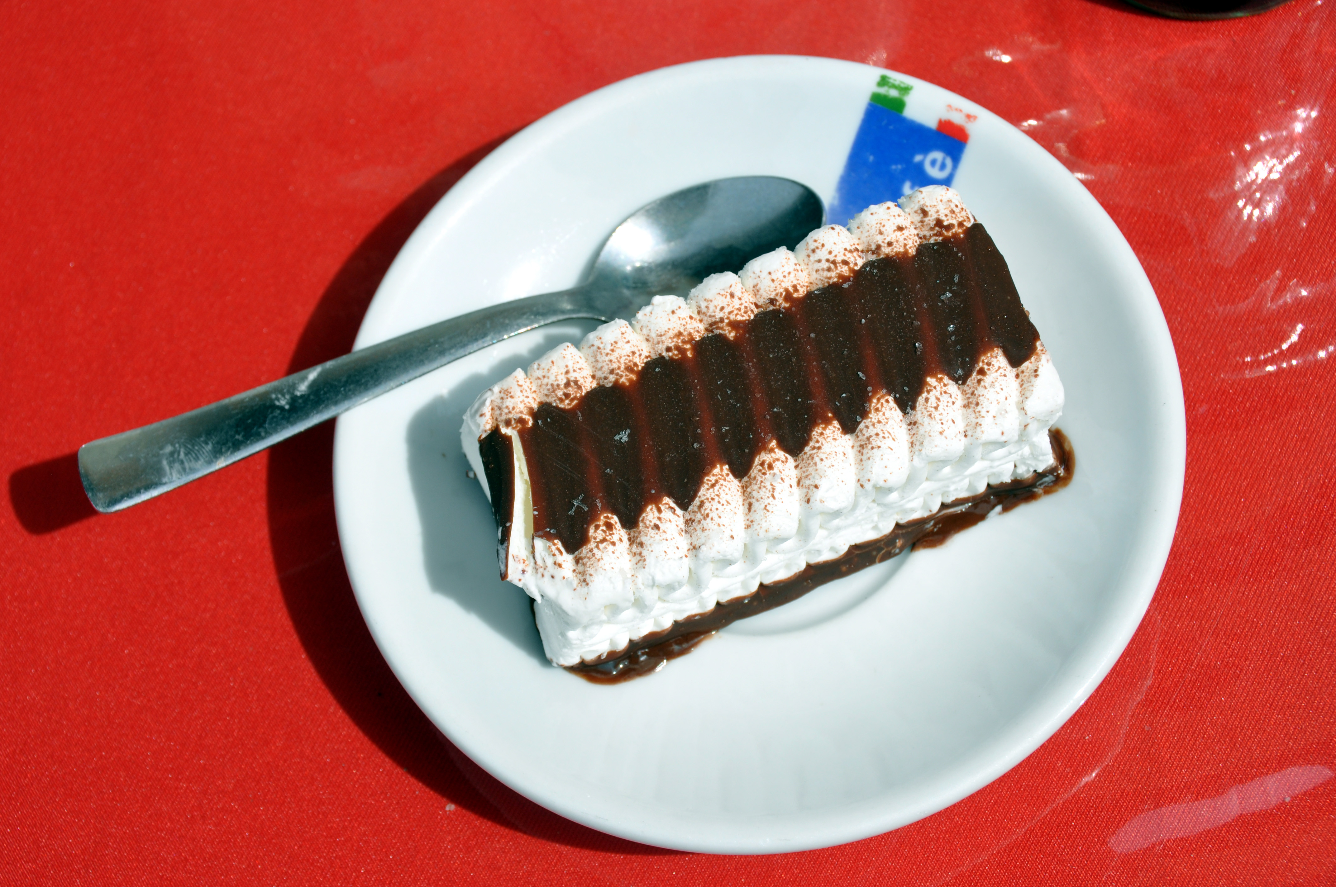 Viennetta